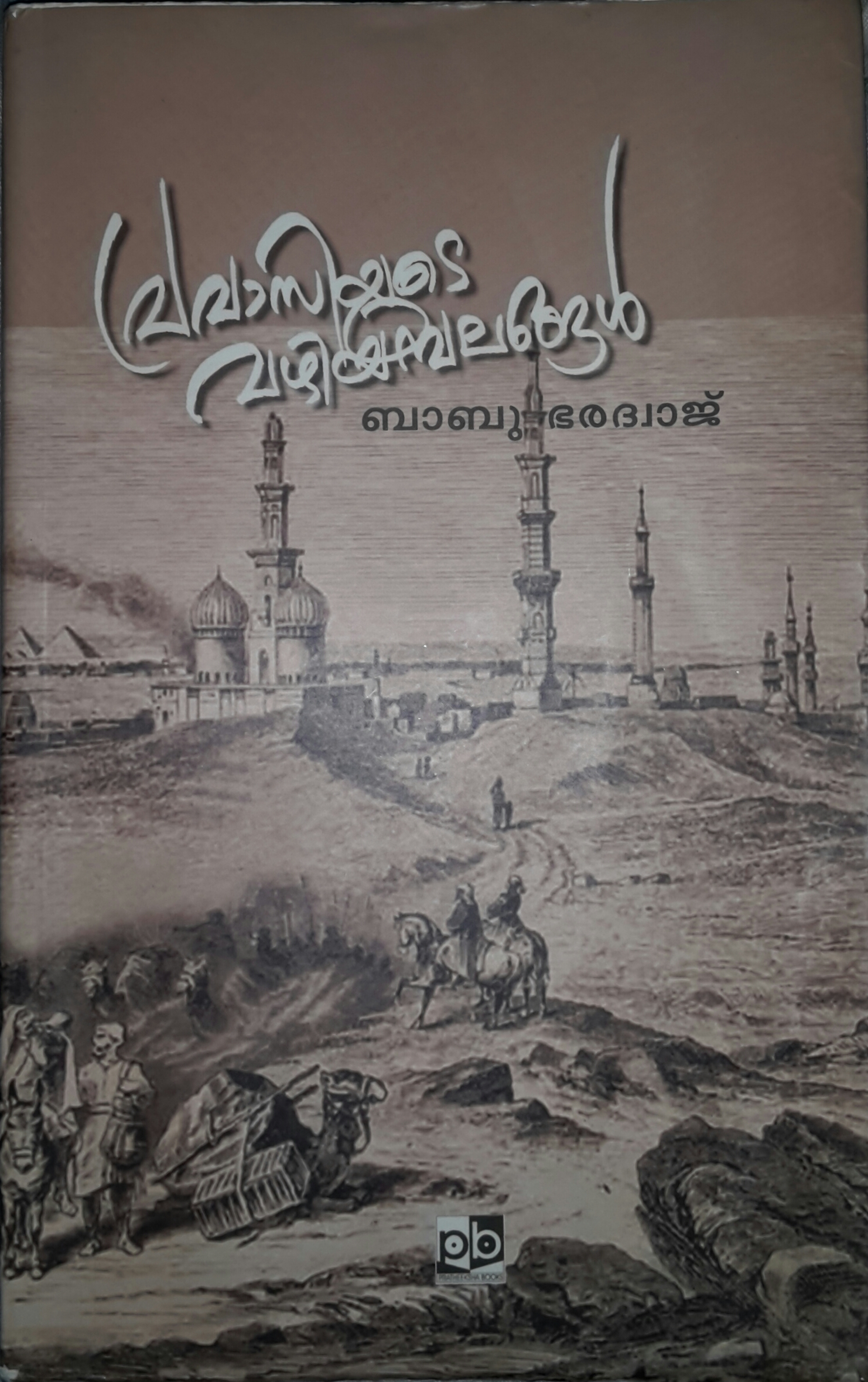 പ്രവാസിയുടെ വഴിയമ്പലങ്ങൾ ഒന്നാം പതിപ്പിന്റെ കവർ